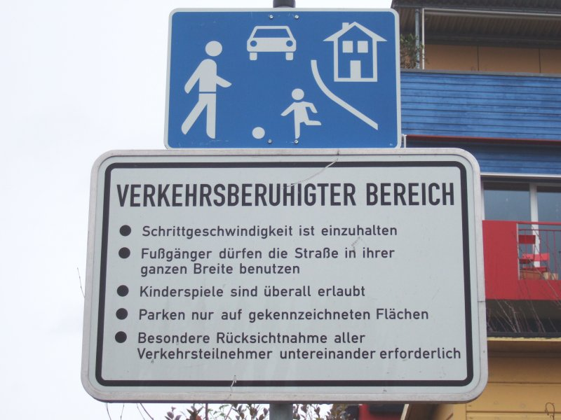 Regles de circulation à Freiburg, quartier Vauban